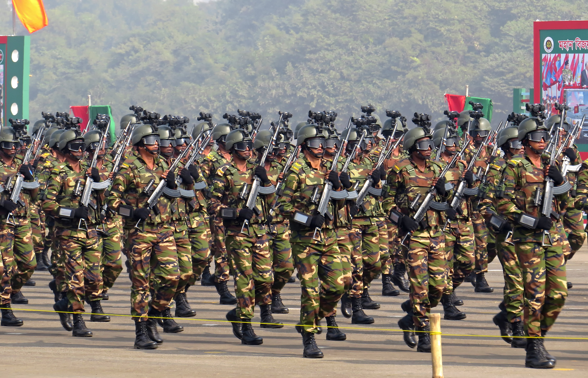 VGTJ 2016.